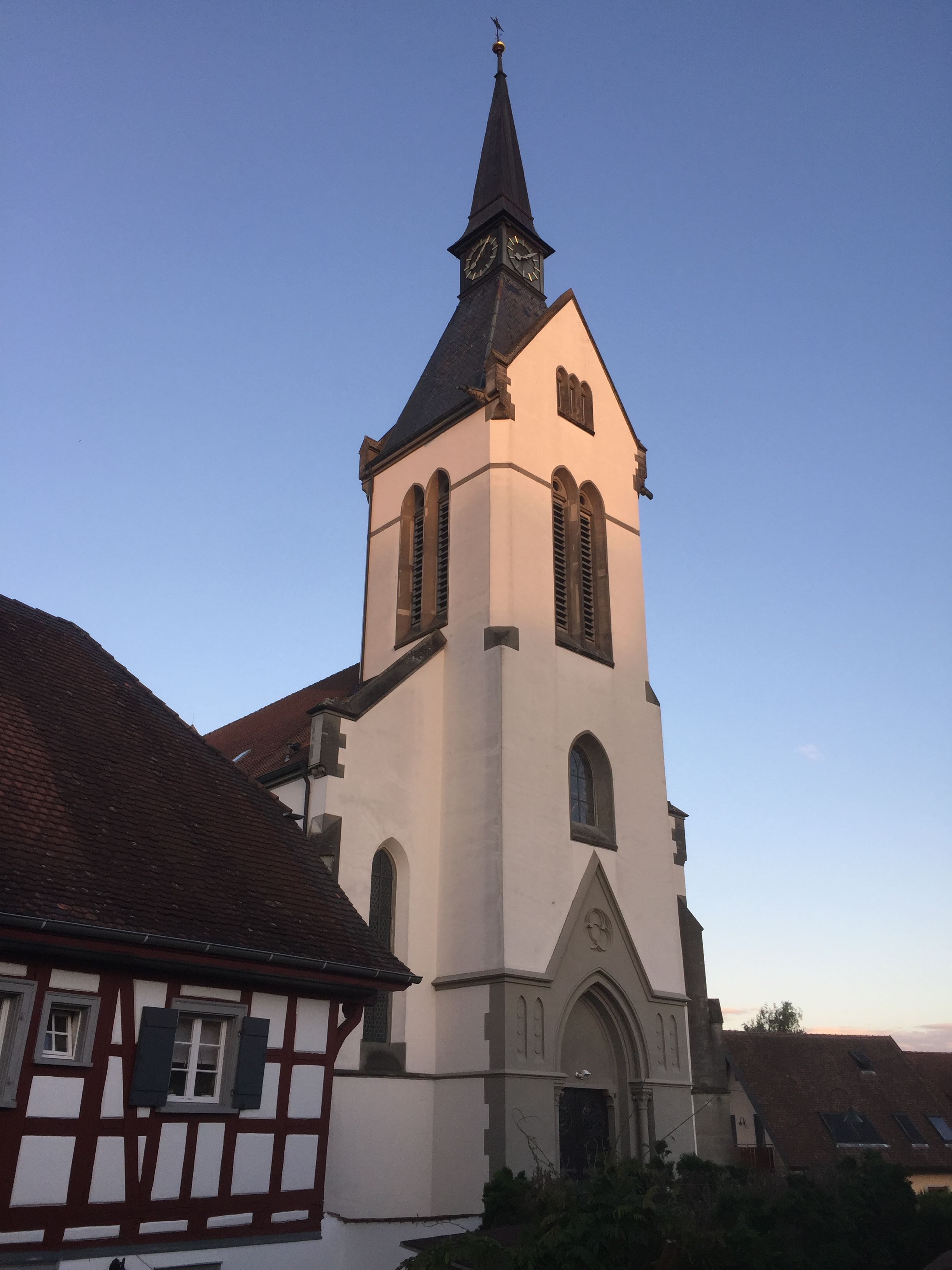 Unsere Liebe Frau in Lippertsreute.